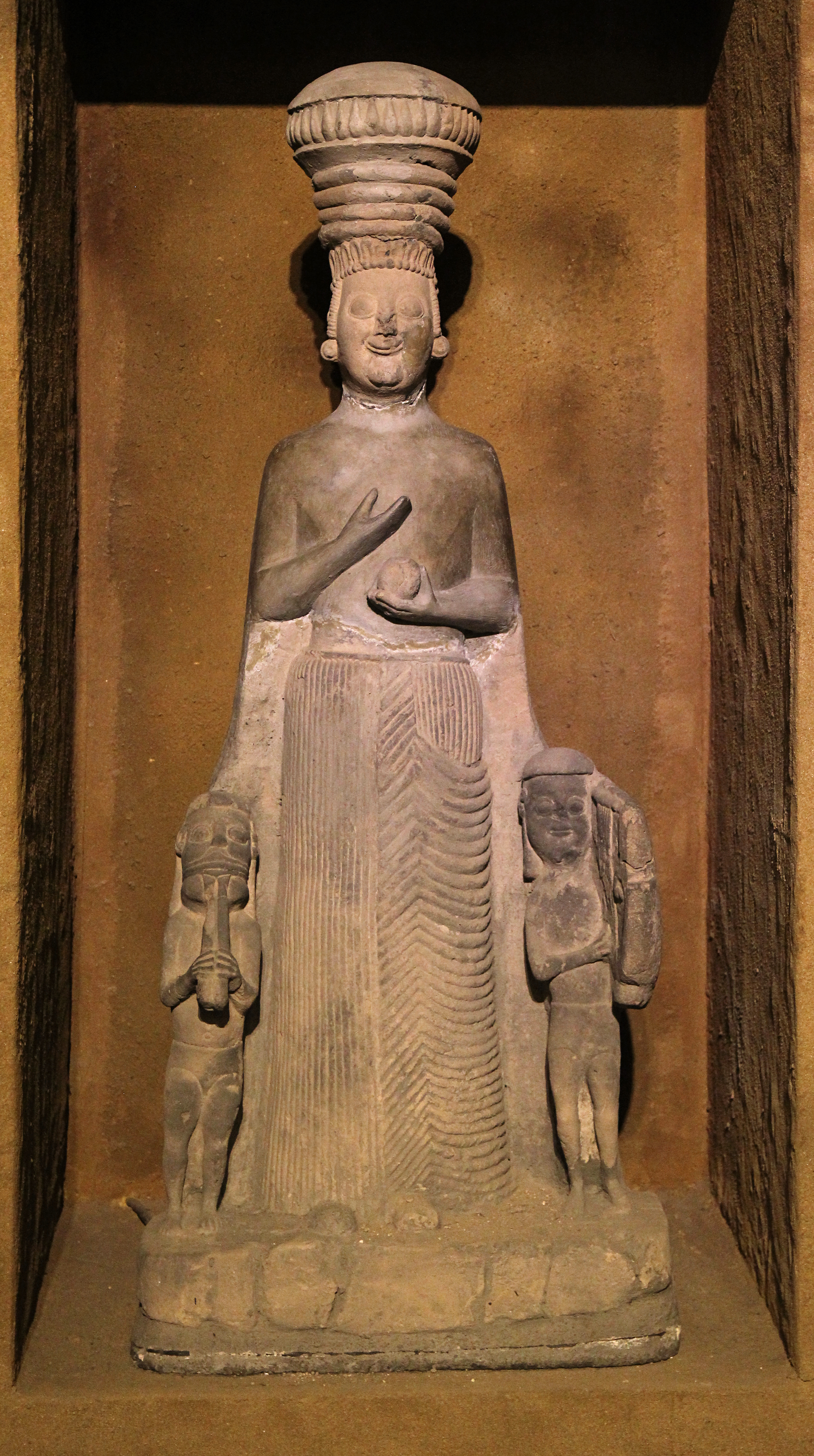 Statue der Kybele, gefunden in einem phrygischen Torbau auf dem Hügel Büyükkale in der hethitischen Hauptstadt Ḫattuša, Museum für anatolische Zivilisationen, Ankara